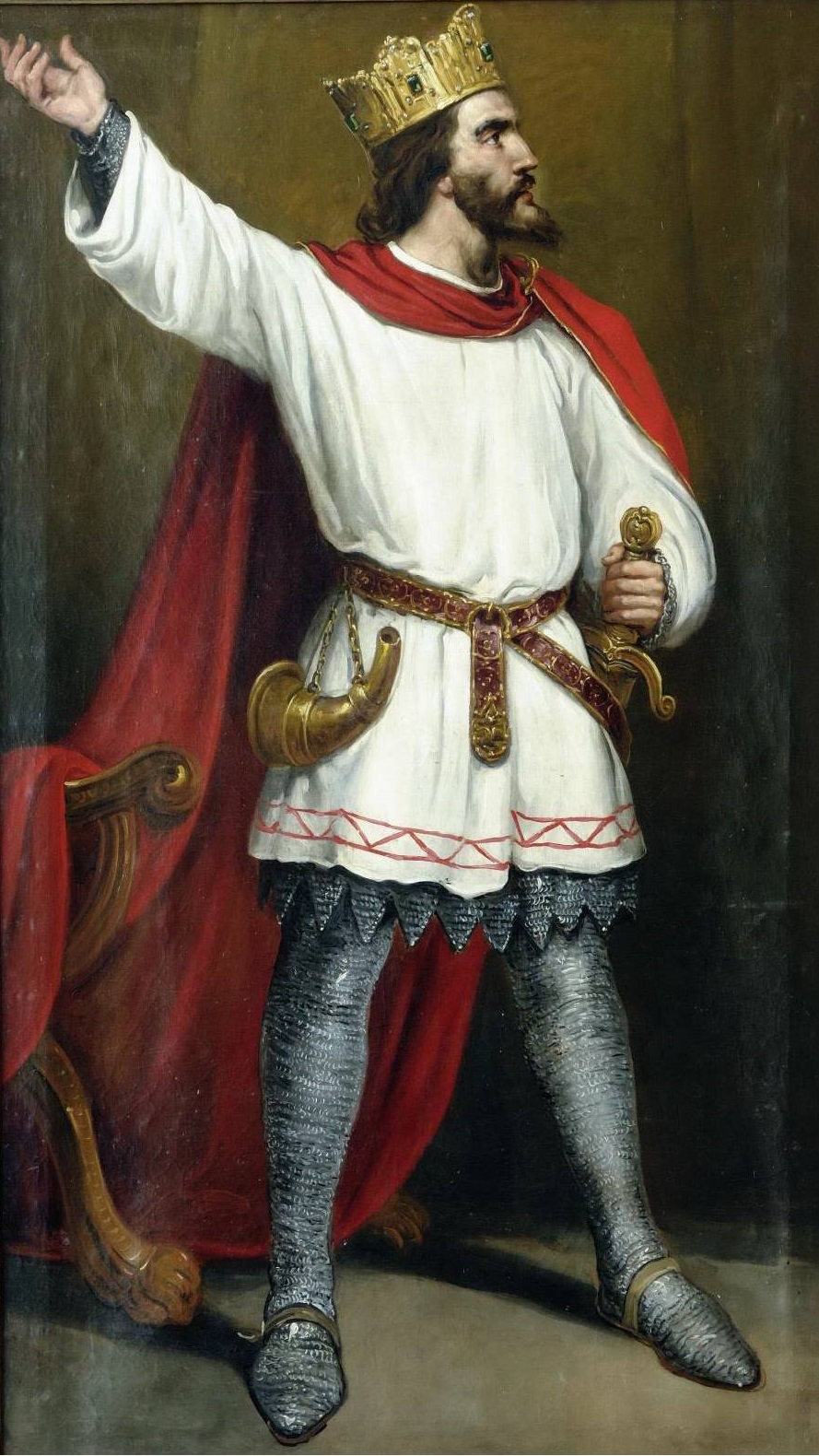 Retrato imaginario del rey Ordoño III de León (c.925-956). Fue hijo del rey Ramiro II de León y de la reina Adosinda Gutiérrez. Reinó durante cinco años y fue sucedido por su hermanastro, Sancho I de León.